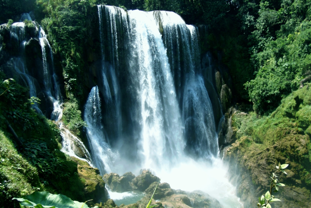 Catarata de Pulhapanzak, Honduras.